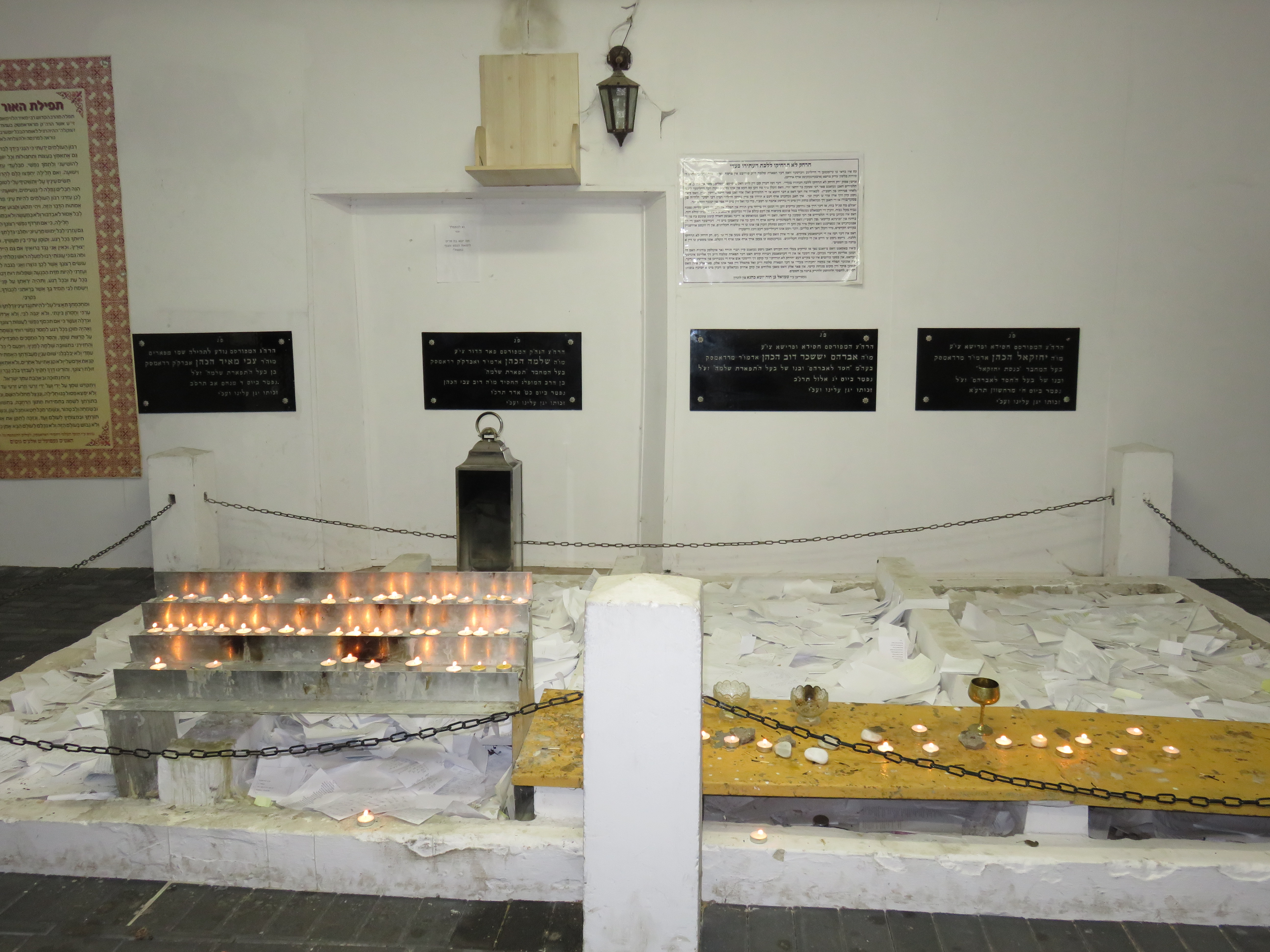 אוהל האדמו"רים מראדומסק ובני משפחותיהם (6).jpg